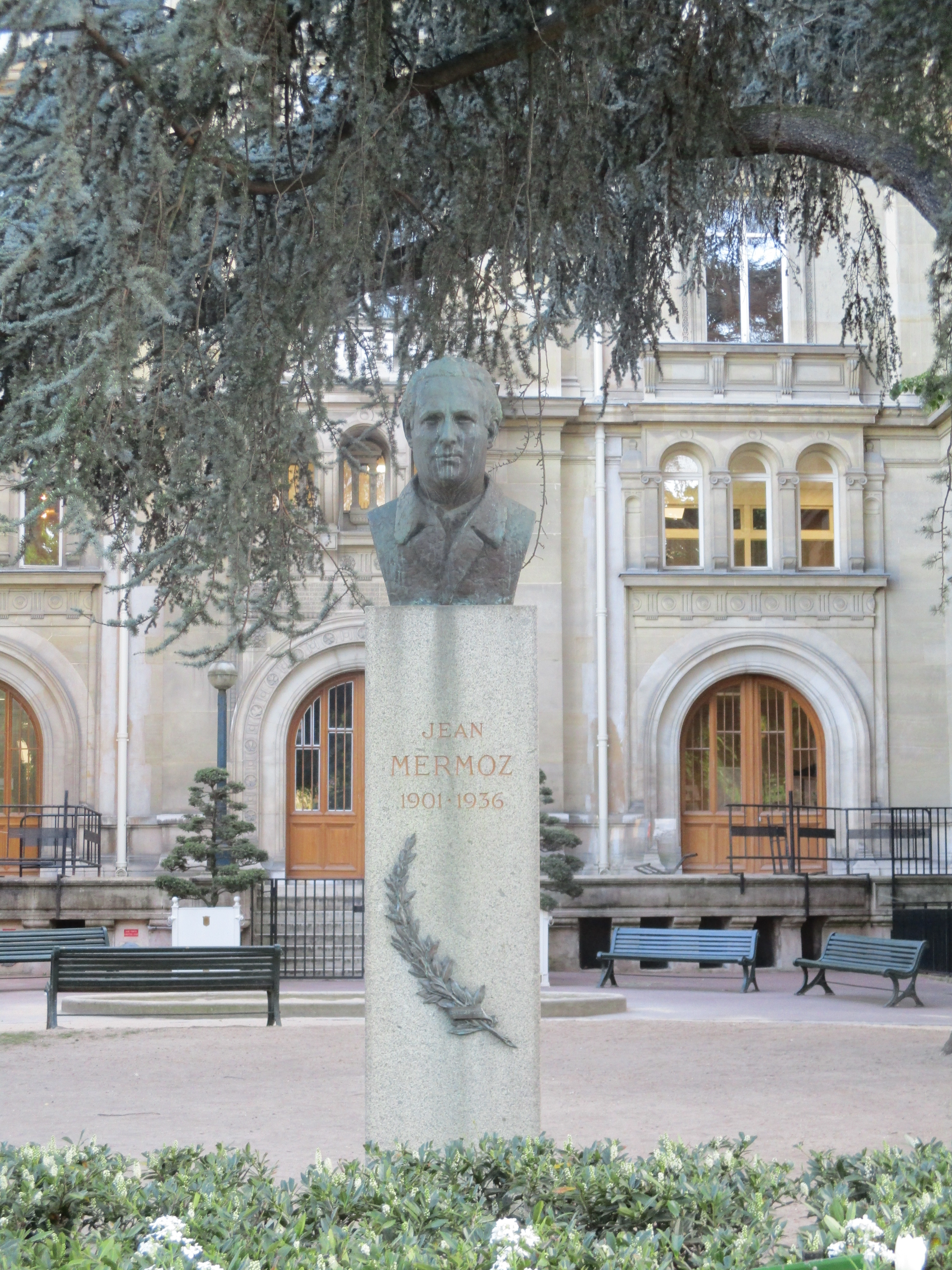 Buste de Jean Mermoz donnant sur le boulevard du même nom à Neuilly-sur-Seine.